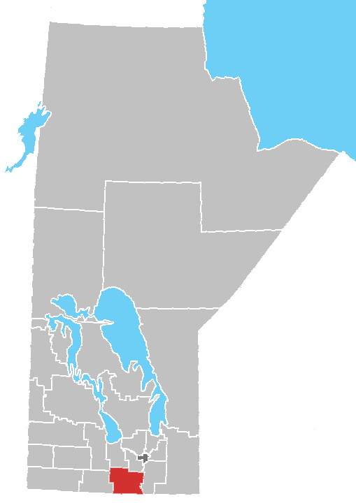 Manitoba census area No. 3